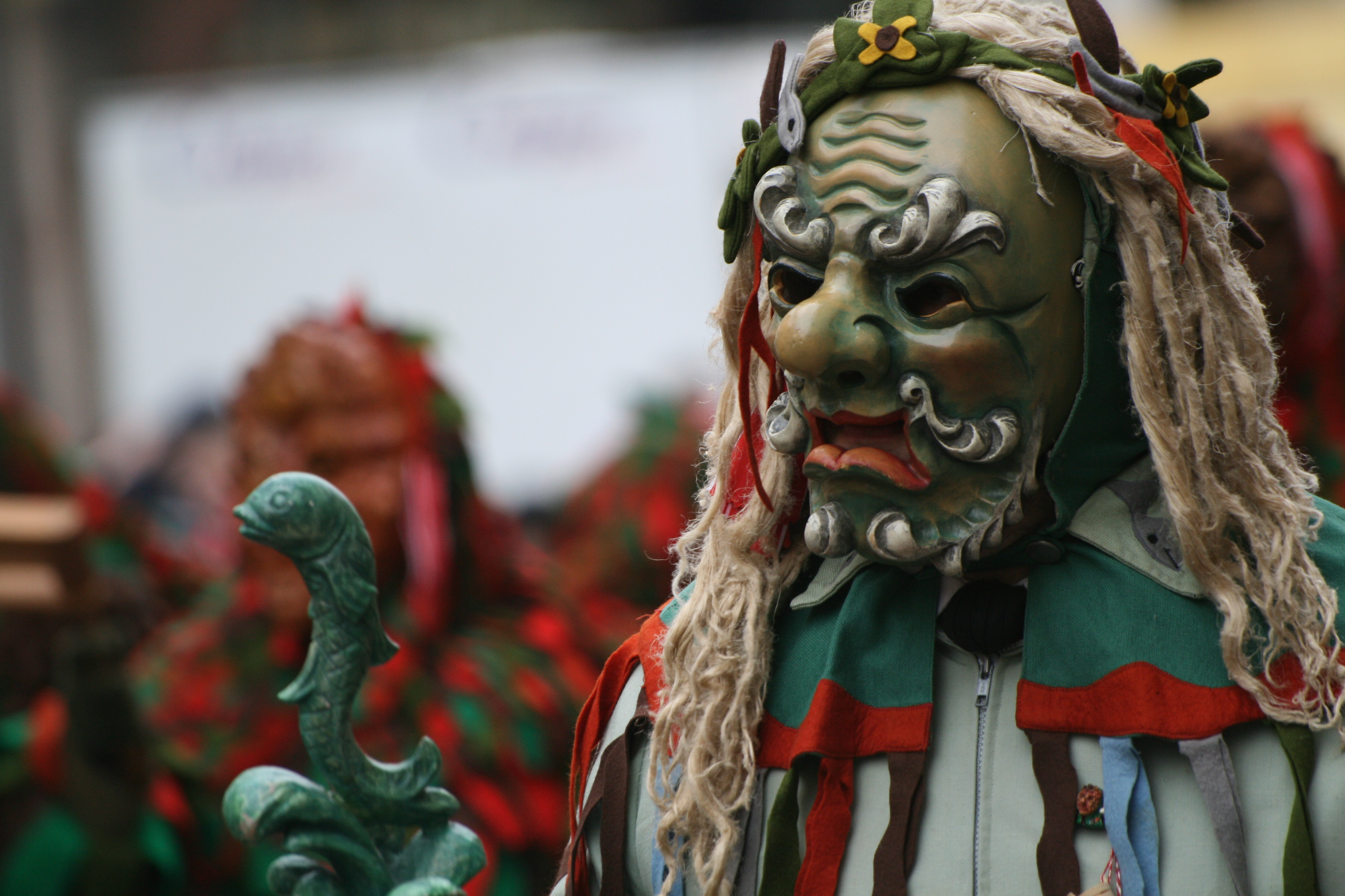 Kübelesmarkt Bad Cannstatt, Narrengilde der Felben: Einzelfigur „Der Brunnengeist“ (fotografiert in Freiburg i. Br., 2009)